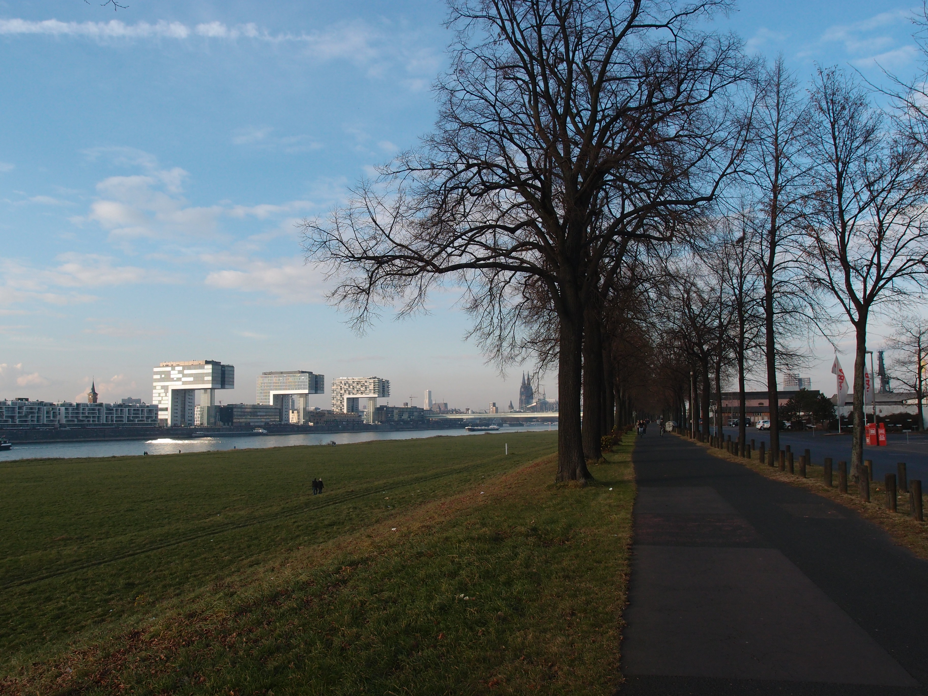 Alfred-Schütte-Allee (in: Köln-Deutz) Datum: 20.11.2011 Urheber: M. Pfeiffer alias Gordito1869 Quelle: Privates Fotoarchiv des Urheber This is the photograph of an architectural monument. It is part of the list of cultural monuments of Köln, no. 523